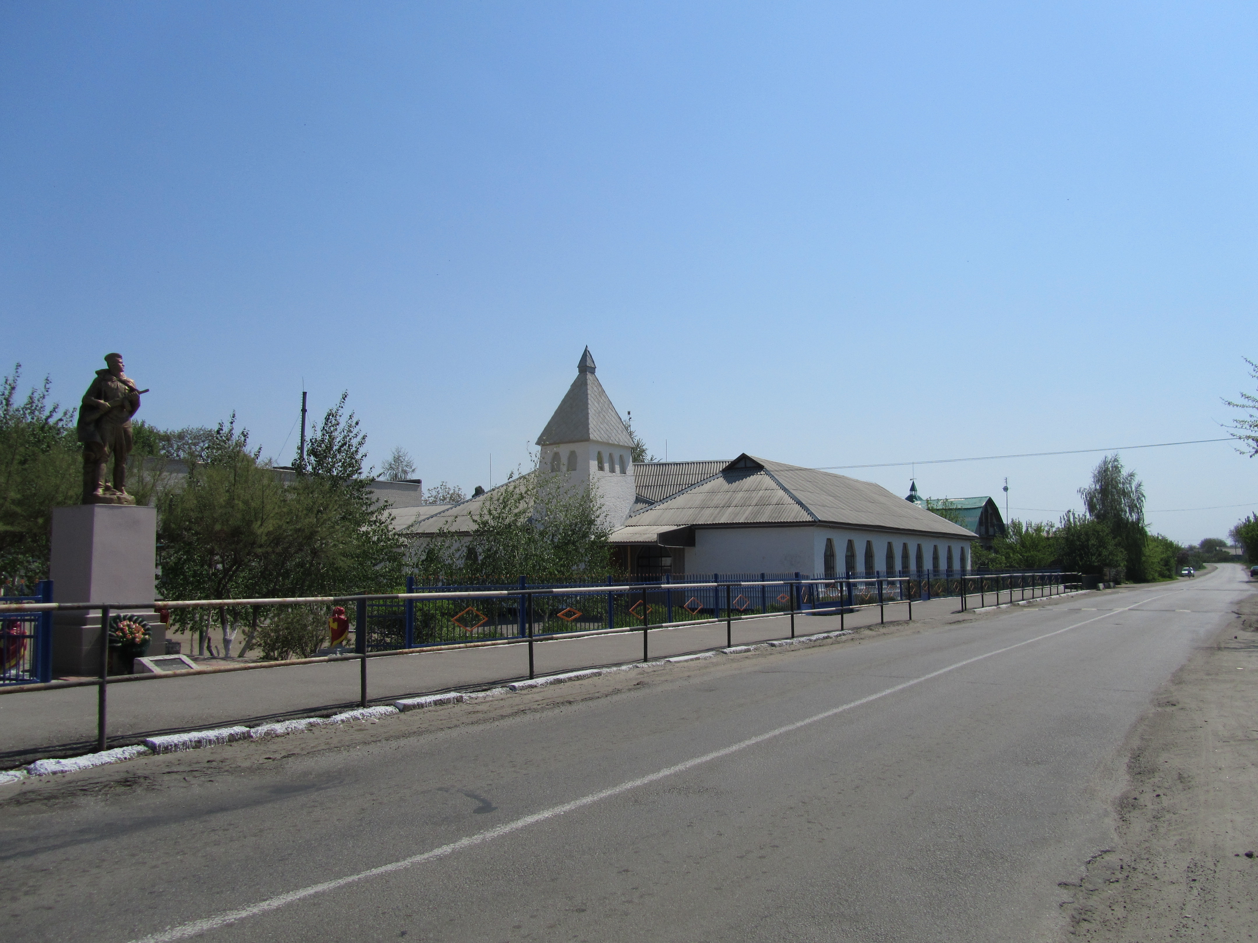 Садки (Кременчуцький район)